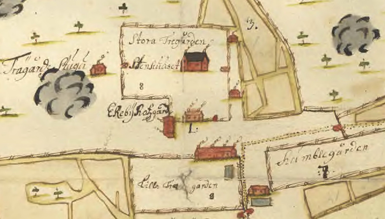 Karta över Ekebyhovs ägor (detalj)